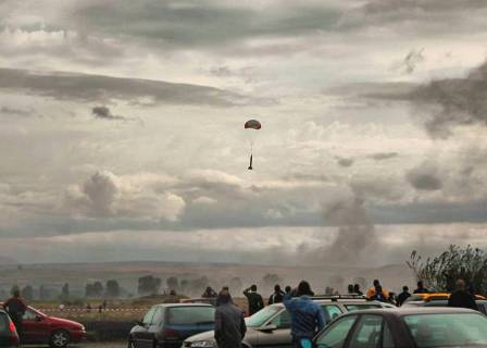 Момент от успешното приземяване на ракетата.